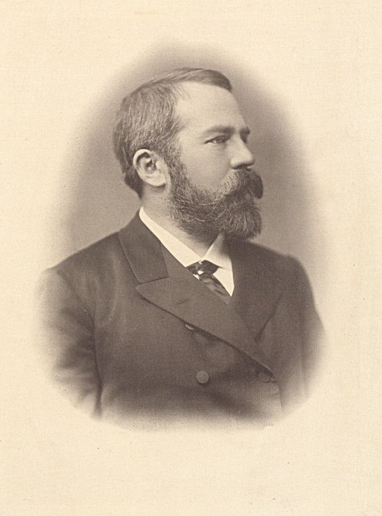 Johann (Hans) Kundrat